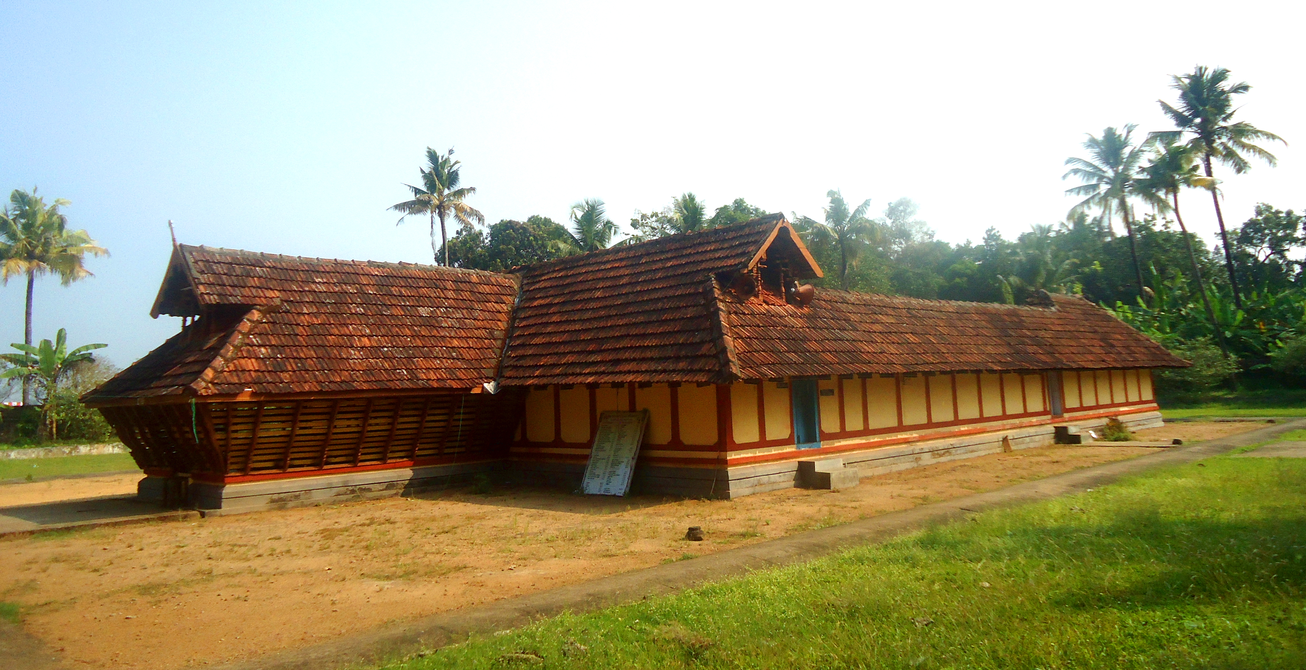 Aavanamokode Saraswathi Temple Aavanamokode Saraswathi Temple Front View